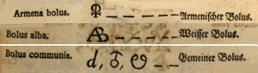 Alchemistische Symbole für Erden